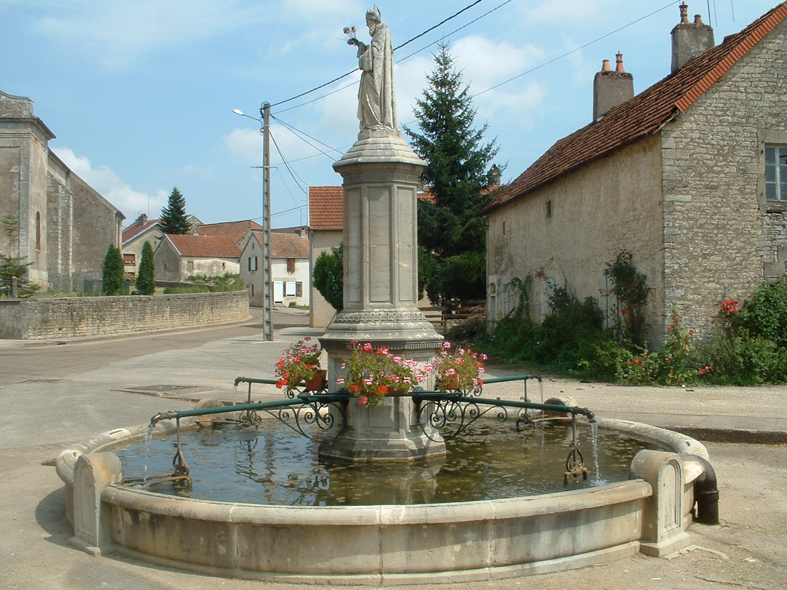 fontaine Saint Didier à Roche (Roche-et-Raucourt, en Haute-Saône)